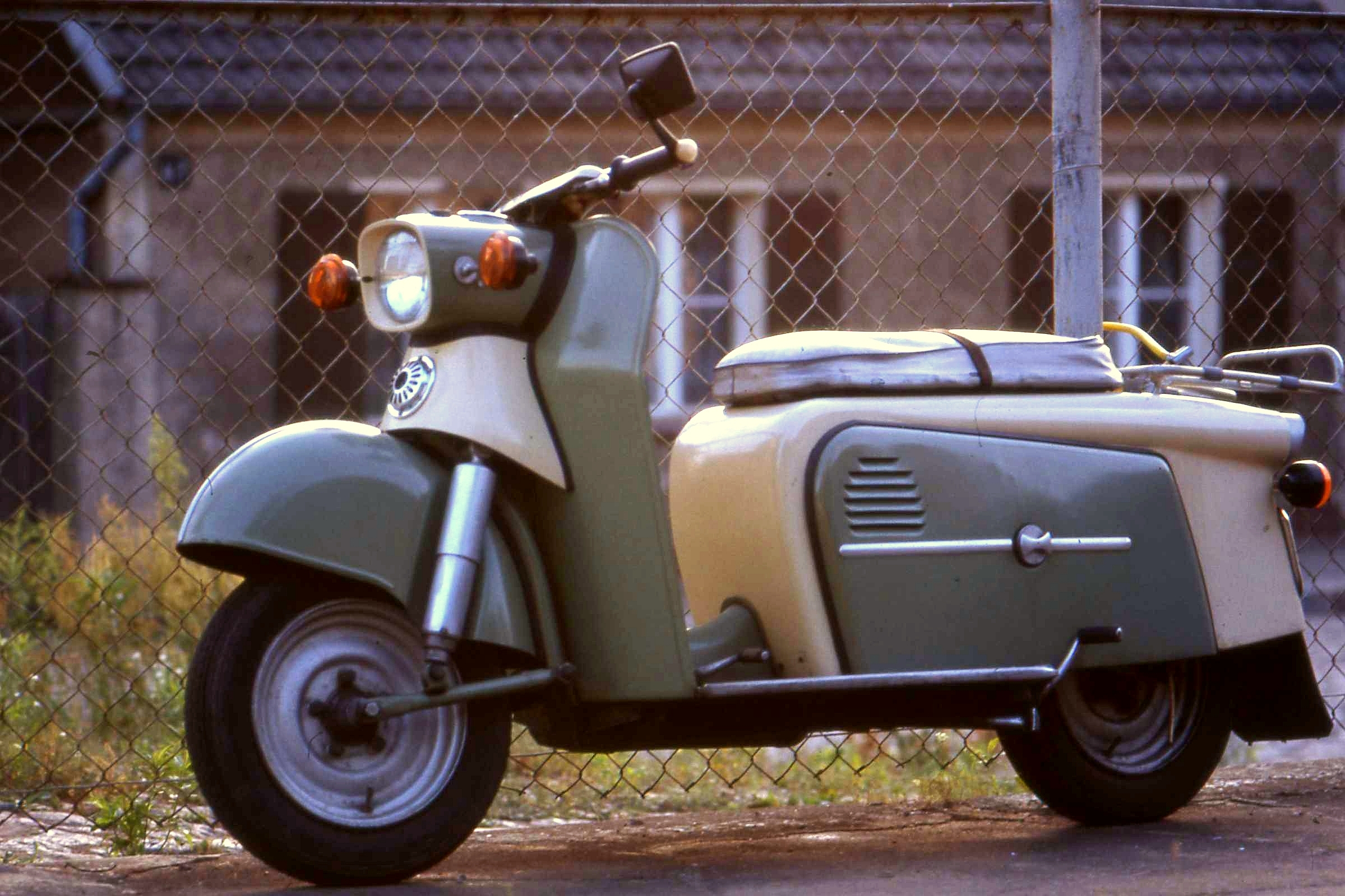 IWL-Stadtroller Troll des Industriewerkes Ludwigsfelde.